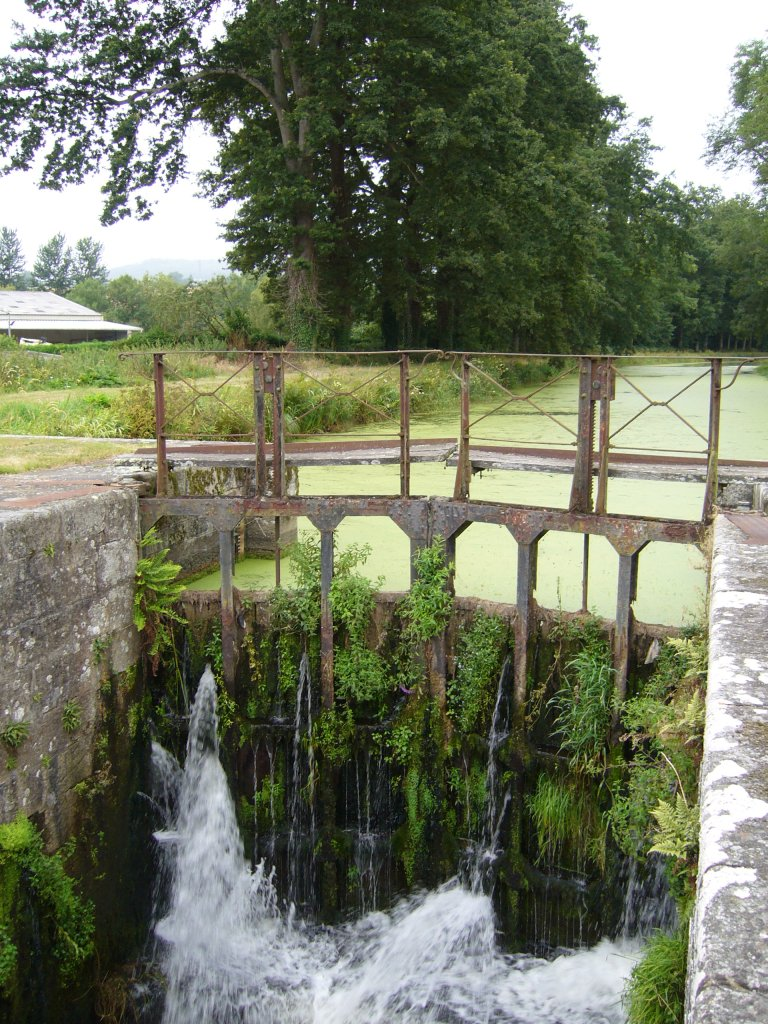 Ecluse abandonnée du canal de Nantes à Brest sur la portion désormais non navigable Pontivy - barrage de Guerlédan